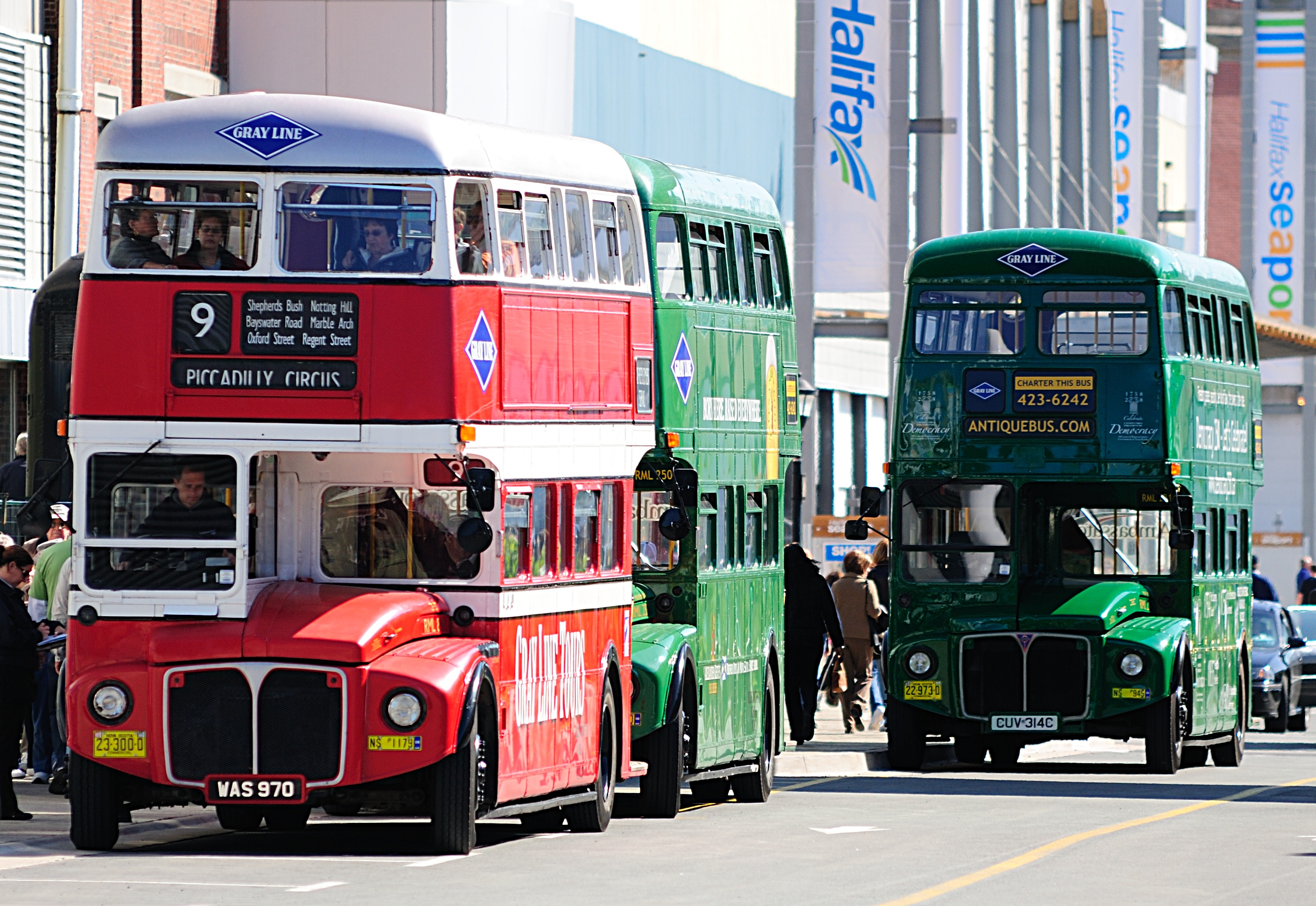 Doppeldeckerbusse vor dem Hafen in Halifax